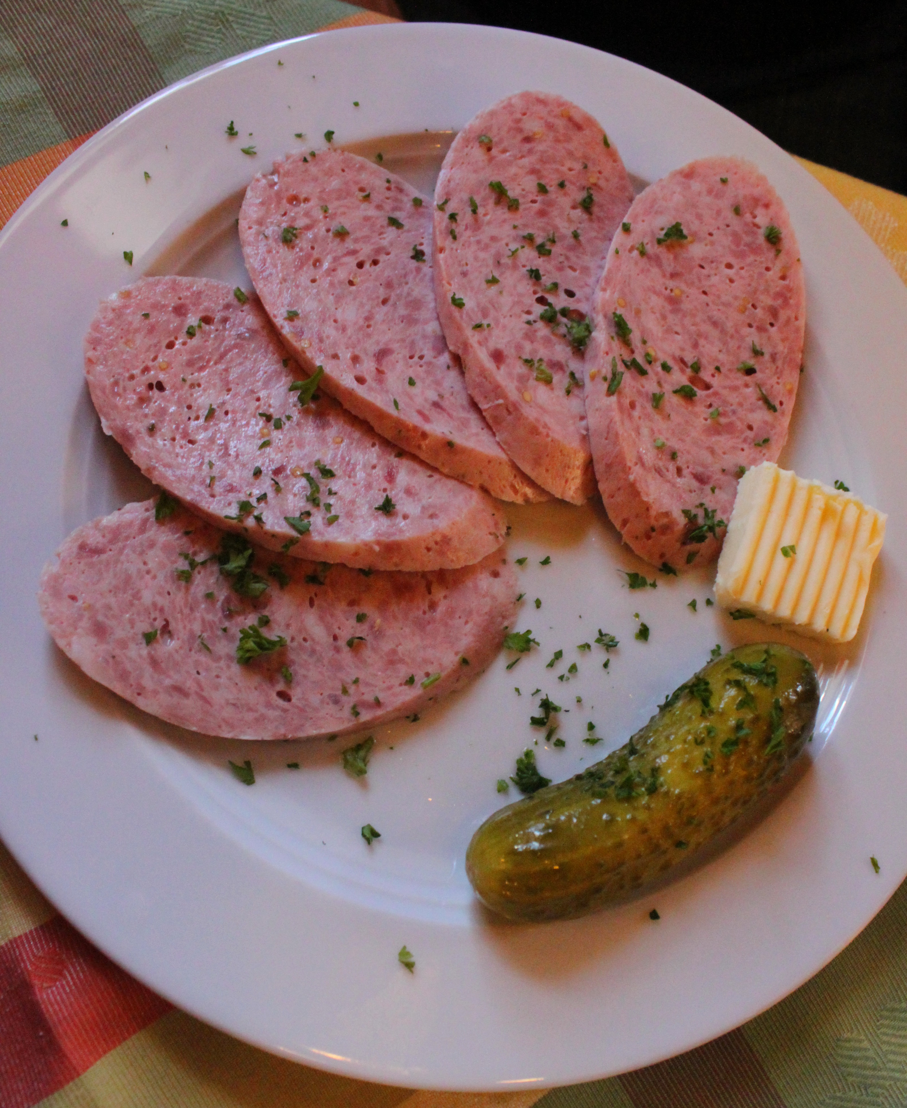 Göttingerplatte im Brauereigasthof Will in Schederndorf. Göttinger Brühwurst mit Butter und Gurke, dazu wird Brot gegessen.